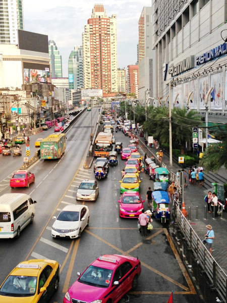 Phetchaburi rd, Thanon Phaya Thai, bangkok